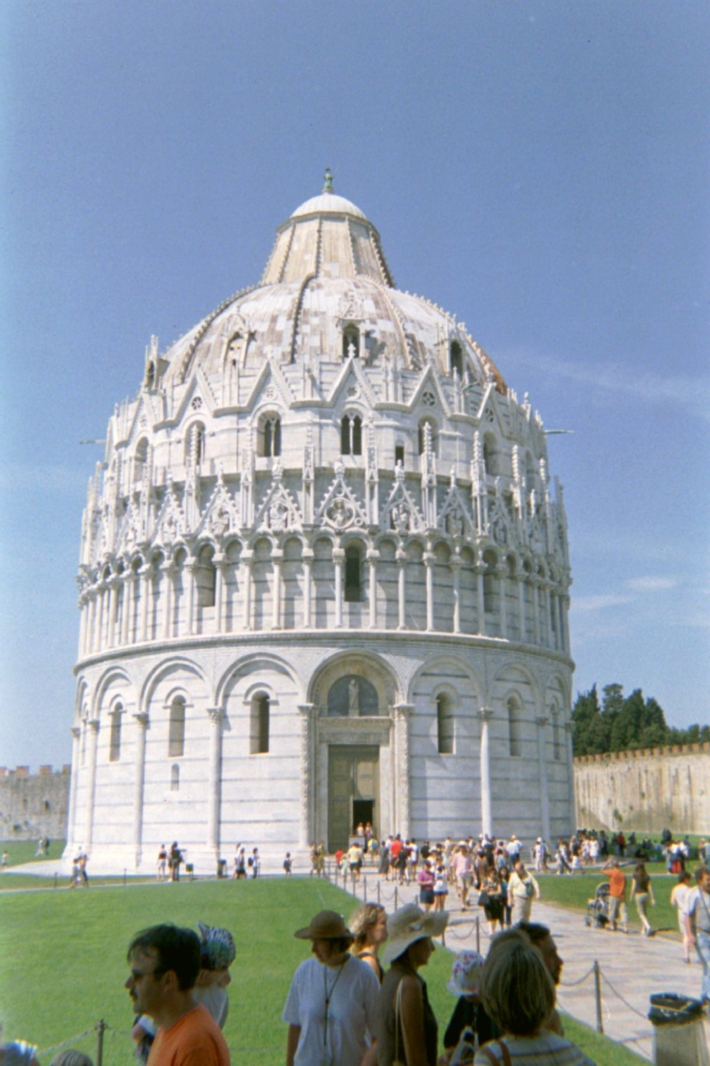 Baptistere de la Piazza Del Duomo Pise Italie 021028 Melusin (GFDL) Melusin propriétaire des négatifs.